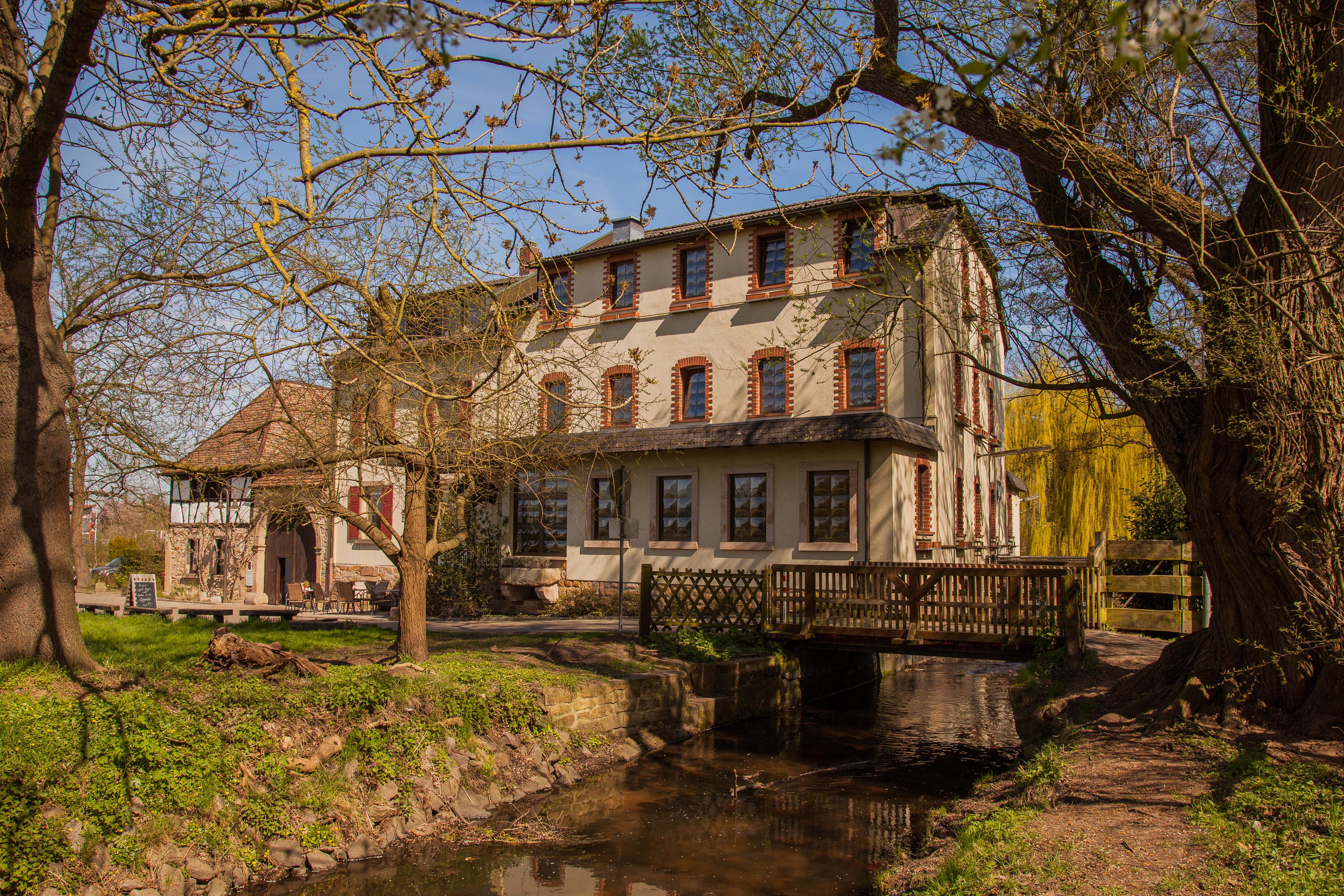 Sägmühle - Ansicht von Westen